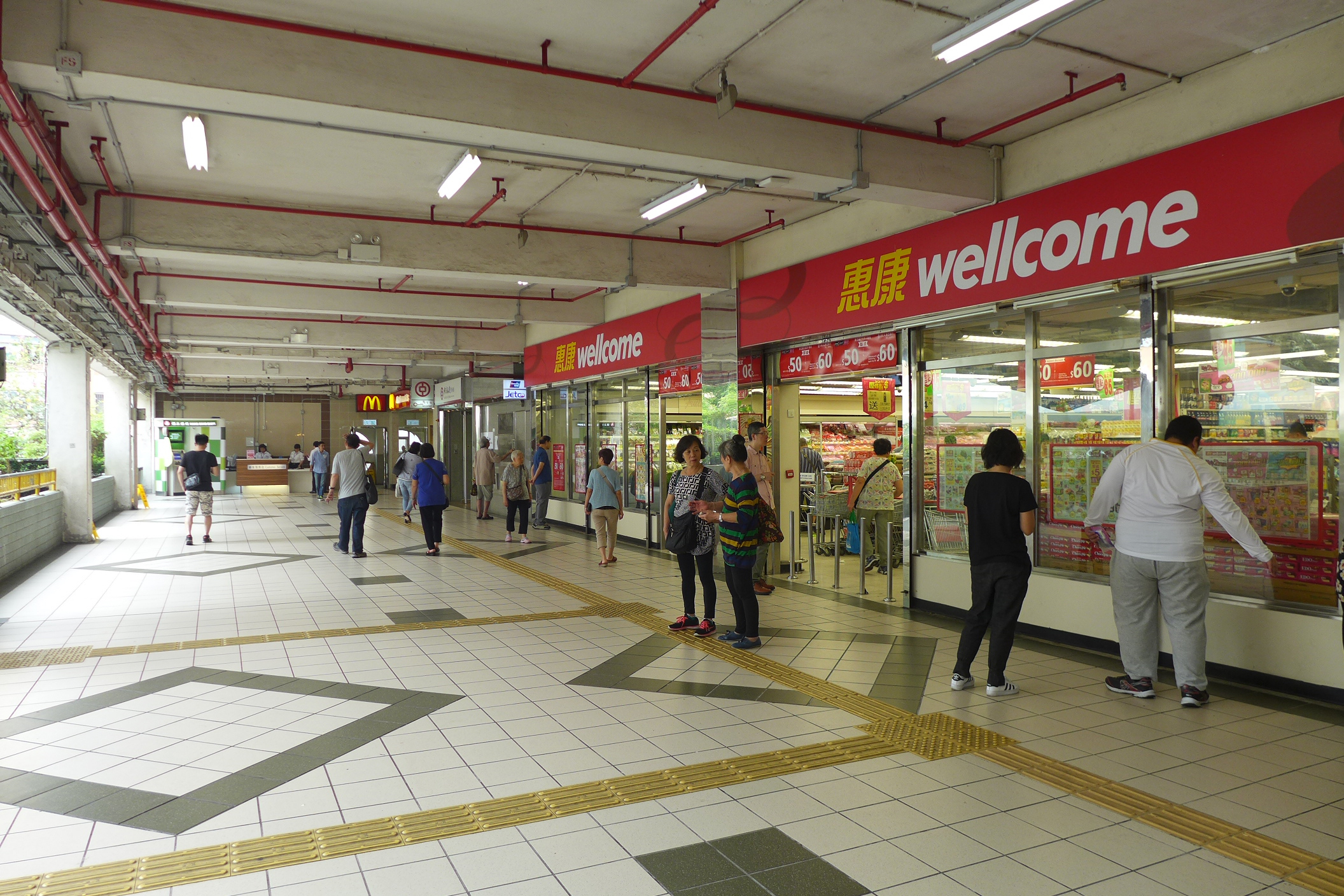 Cheung Hong Estate Shopping Arcade